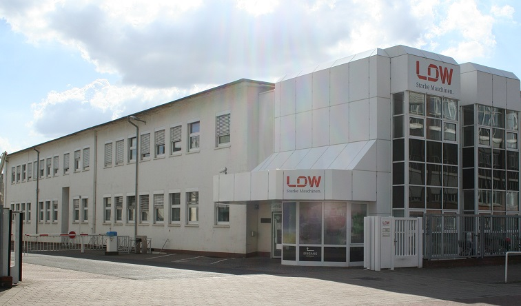 Werkstor der Lloyd Dynamowerke GmbH